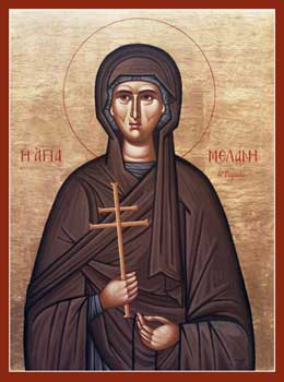 Ícone de Melânia, a Jovem